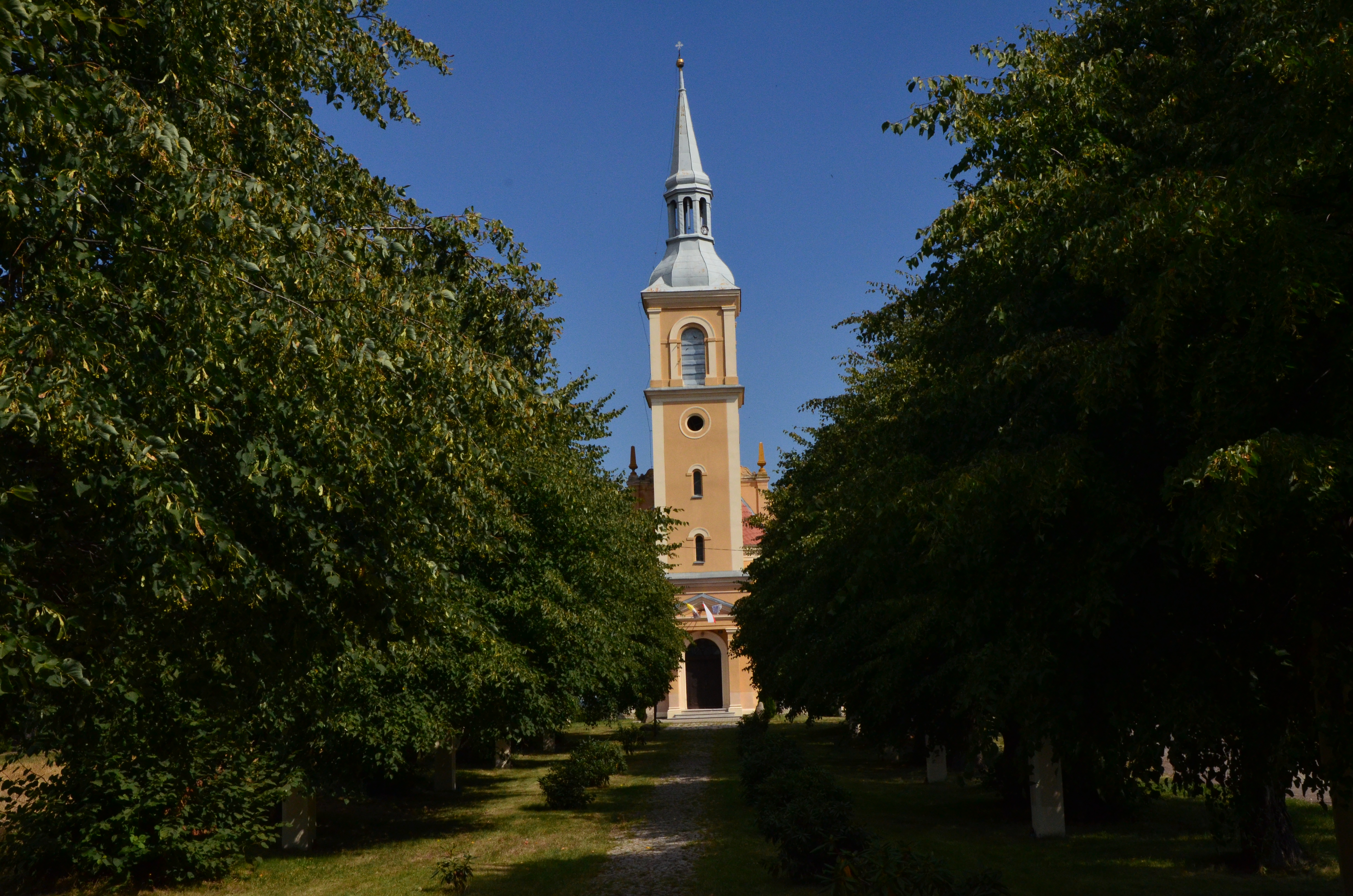 Mroczkowa - rzymskokatolicki kościół filialny pw. MB Wspomożenia Wiernych, 1824